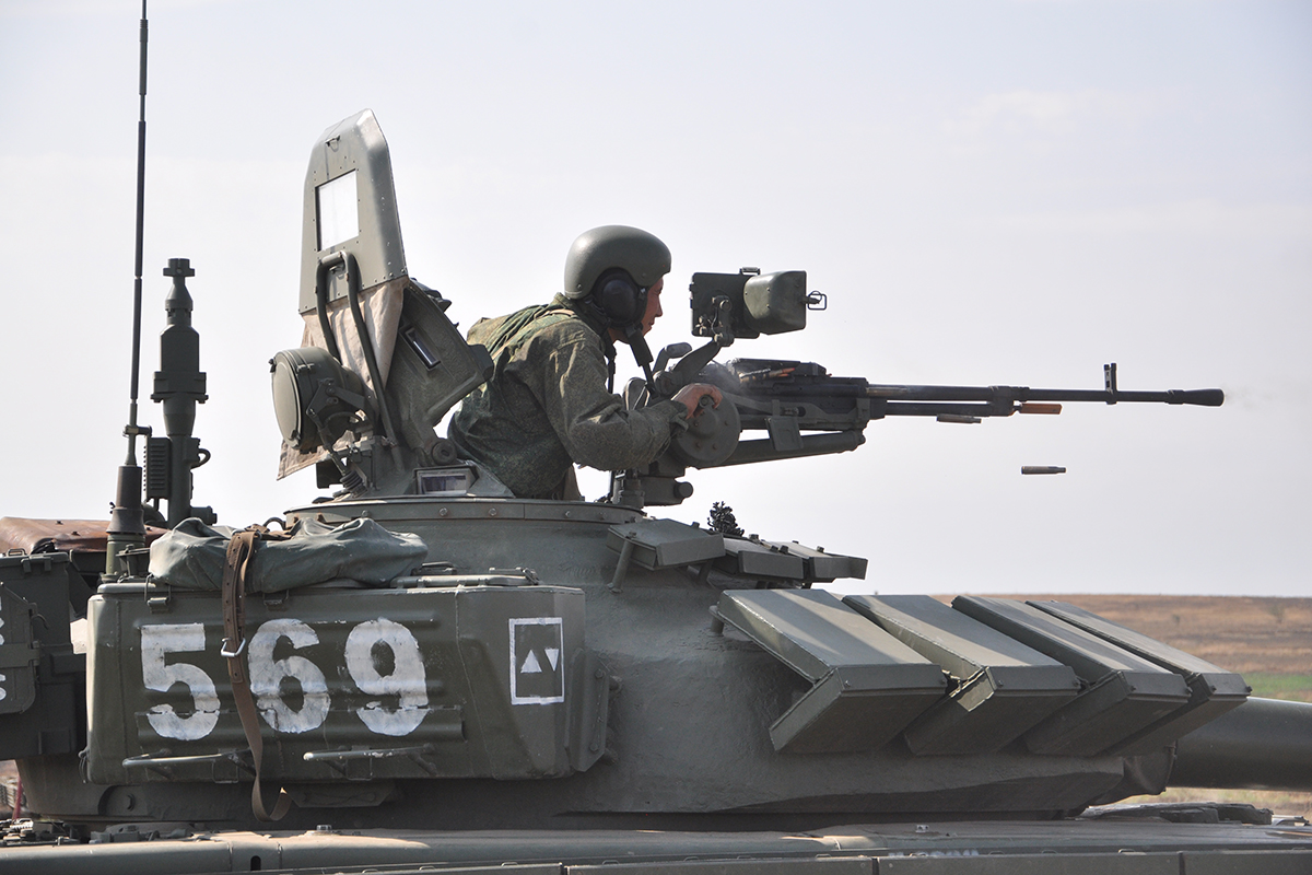 Танкисты мотострелкового соединения ЮВО уничтожили воздушные цели и бронетехнику условного противника в Ростовской области.